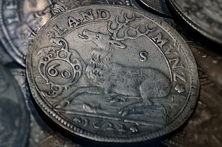 Hirschgulden